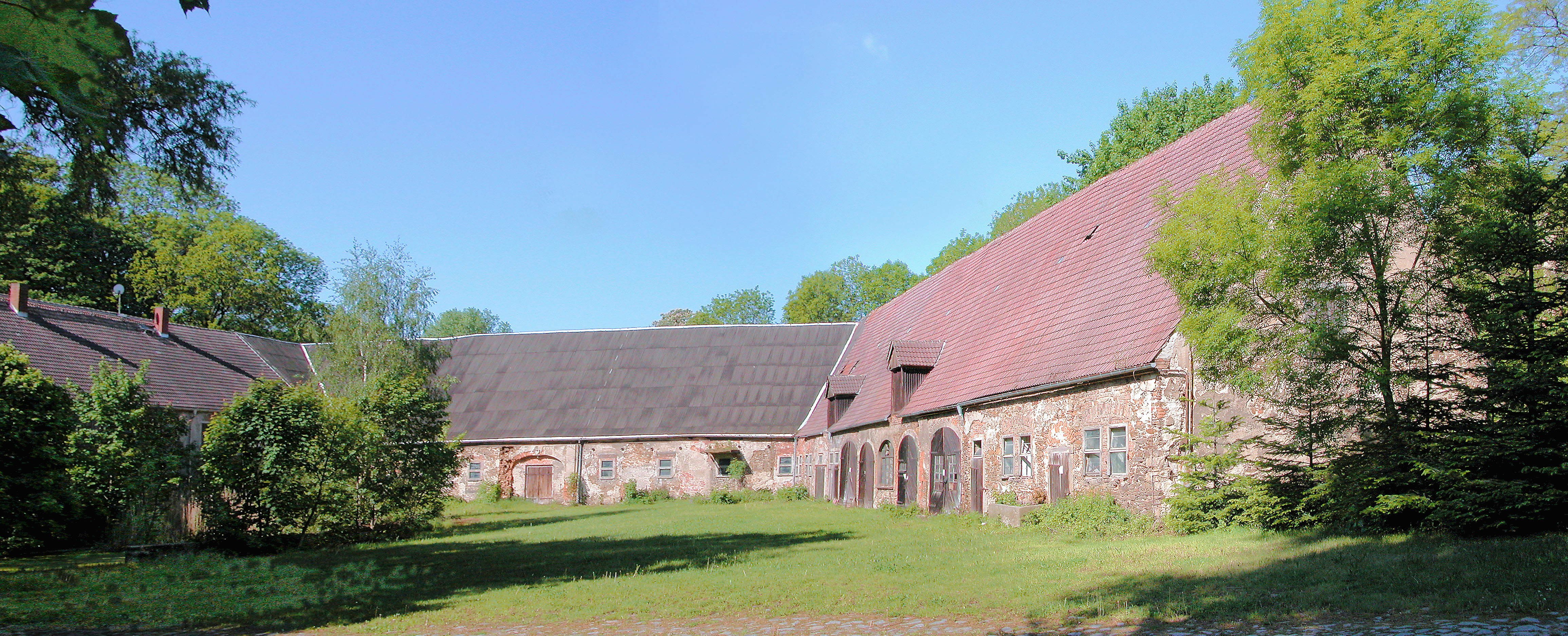 24.05.2006 09629 Neukirchen (Reinsberg), Am Park 6 (GMP: 51.033226,13.383824): Rittergut, in Bildmitte der Kuhstall mit der früheren Durchfahrt zu den Feldern. Rechts der Pferdestall. Das Herrenhaus ist 1959 abgebrannt. [DSCN10188-10189.TIF]20060534025MDR.JPG(c)Blobelt